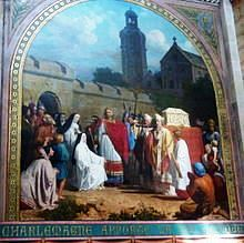 Basilique Saint-Denys in Argenteuil